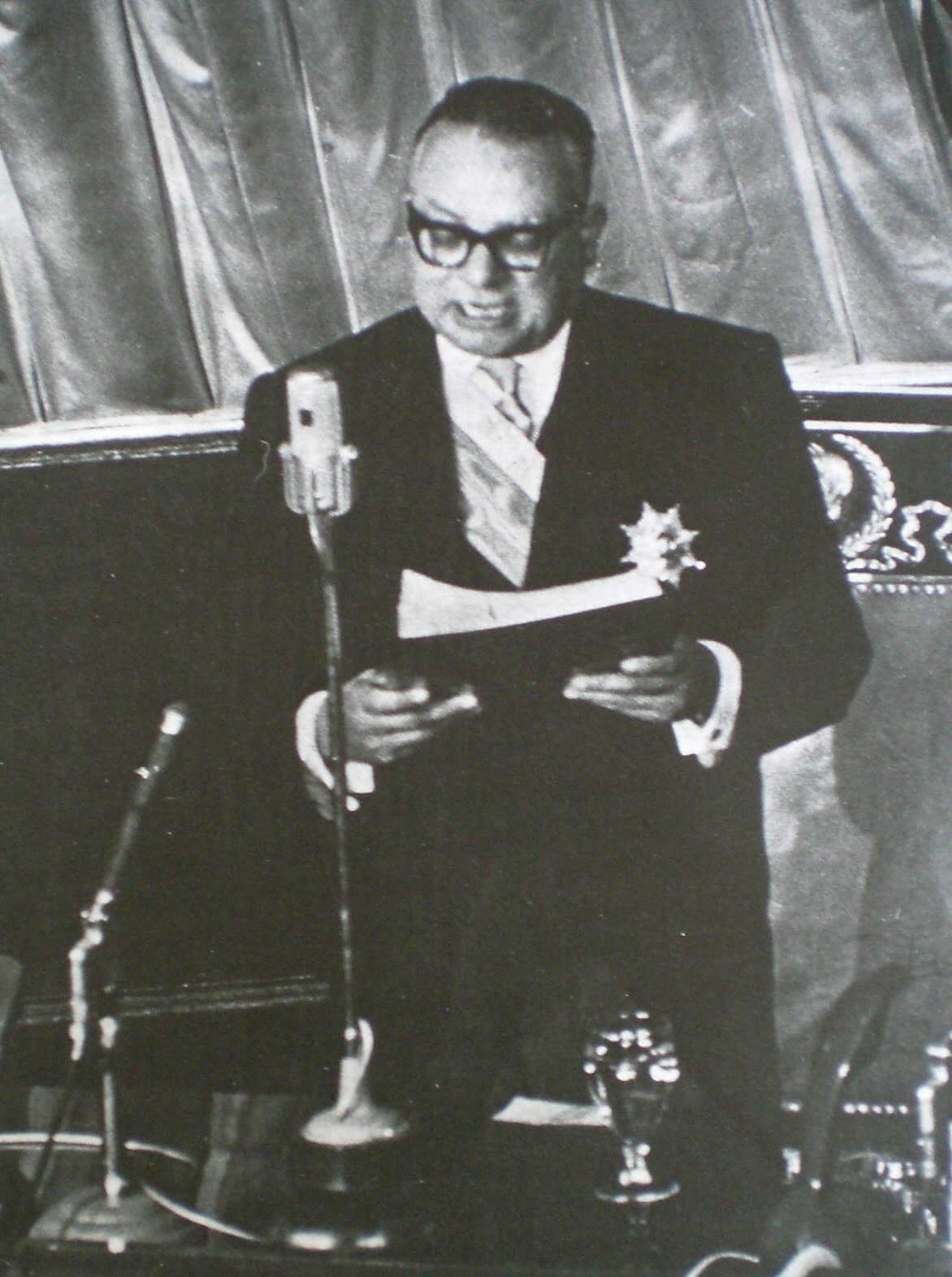 Rómulo Betancourt dando un mensaje a la nación, durante su toma de posesión como presidente de Venezuela en 1959.